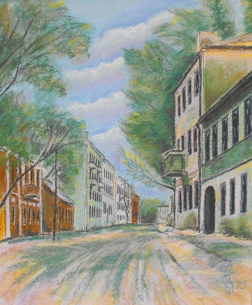 Минск. Улица Освобождения. Территория бывшего гетто. 1975 год. Пастель. ДВП. Художник - Анатолий Наливаев. Подарена автором минскому Музею истории и культуры евреев Беларуси.